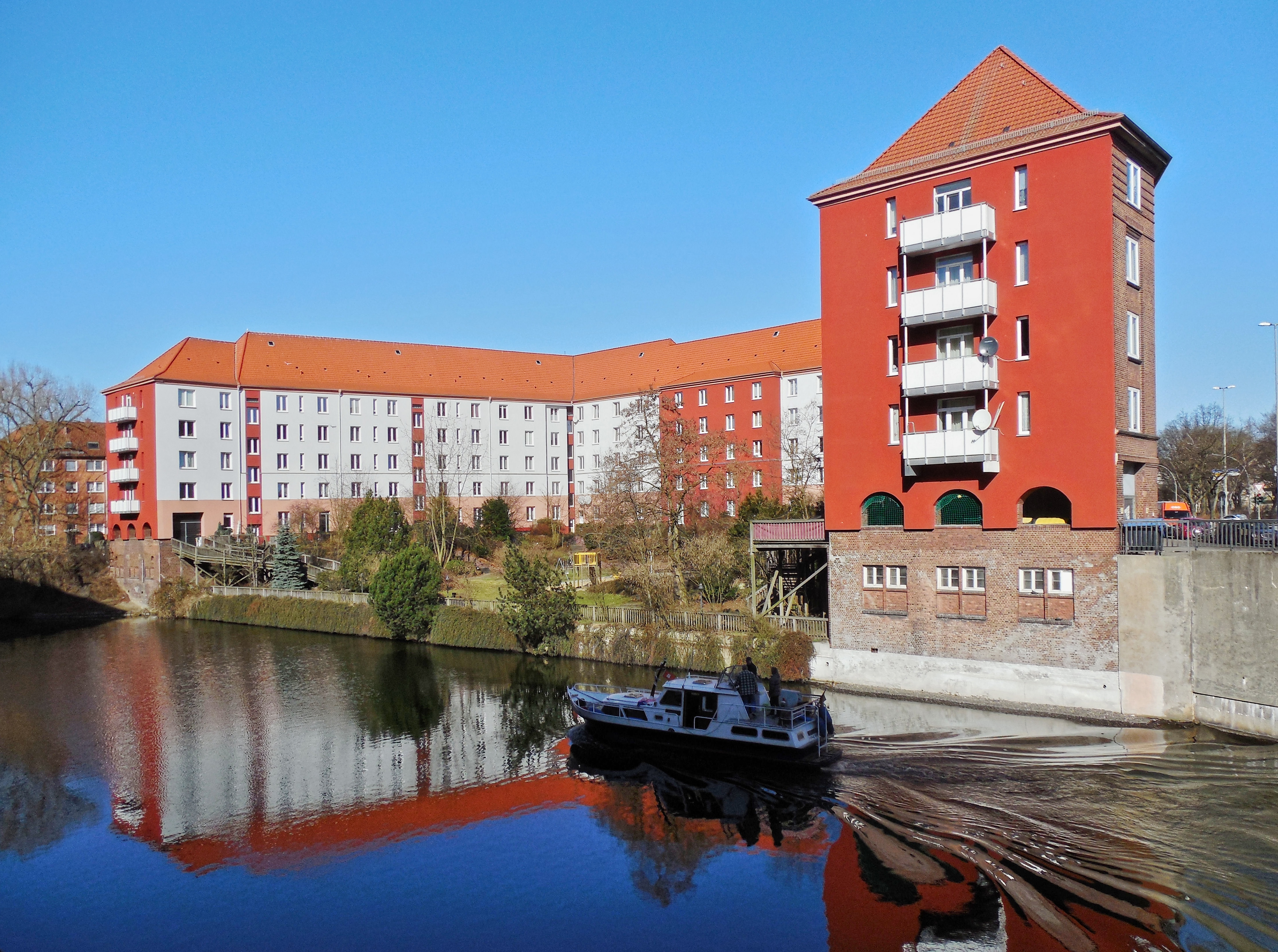 Hamm-Süd (Diagonalstraße/Mittelkanal), Hamburg, Germany